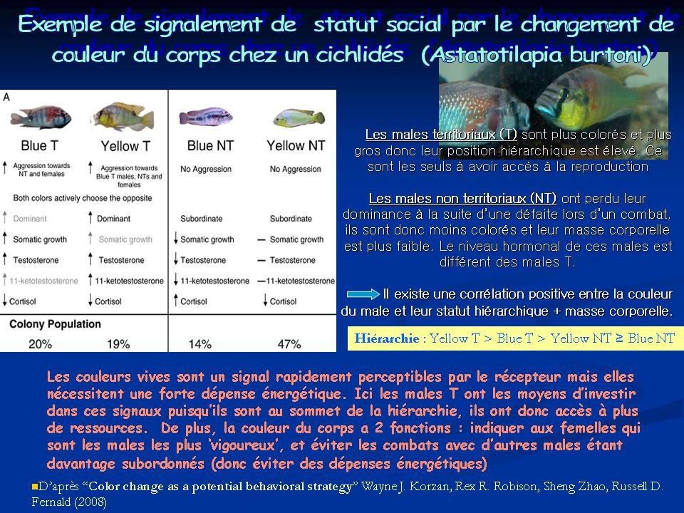 Dans cet exemple, le signalement de statut social concerne les males territoriaux. Ils utilisent un signal visuel pour montrer leur dominance. En effet, ce signal s’exprime par le changement de couleur du corps. Ce dernier dépend de l’état physiologique du moment, puisque la position hiérarchique de ces males varie selon la couleur.